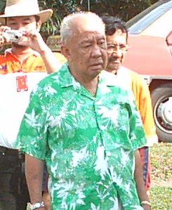 Kebawah Duli Tuanku Sultan mencemar duli melihat para perserta dari Singapura dan Johor.